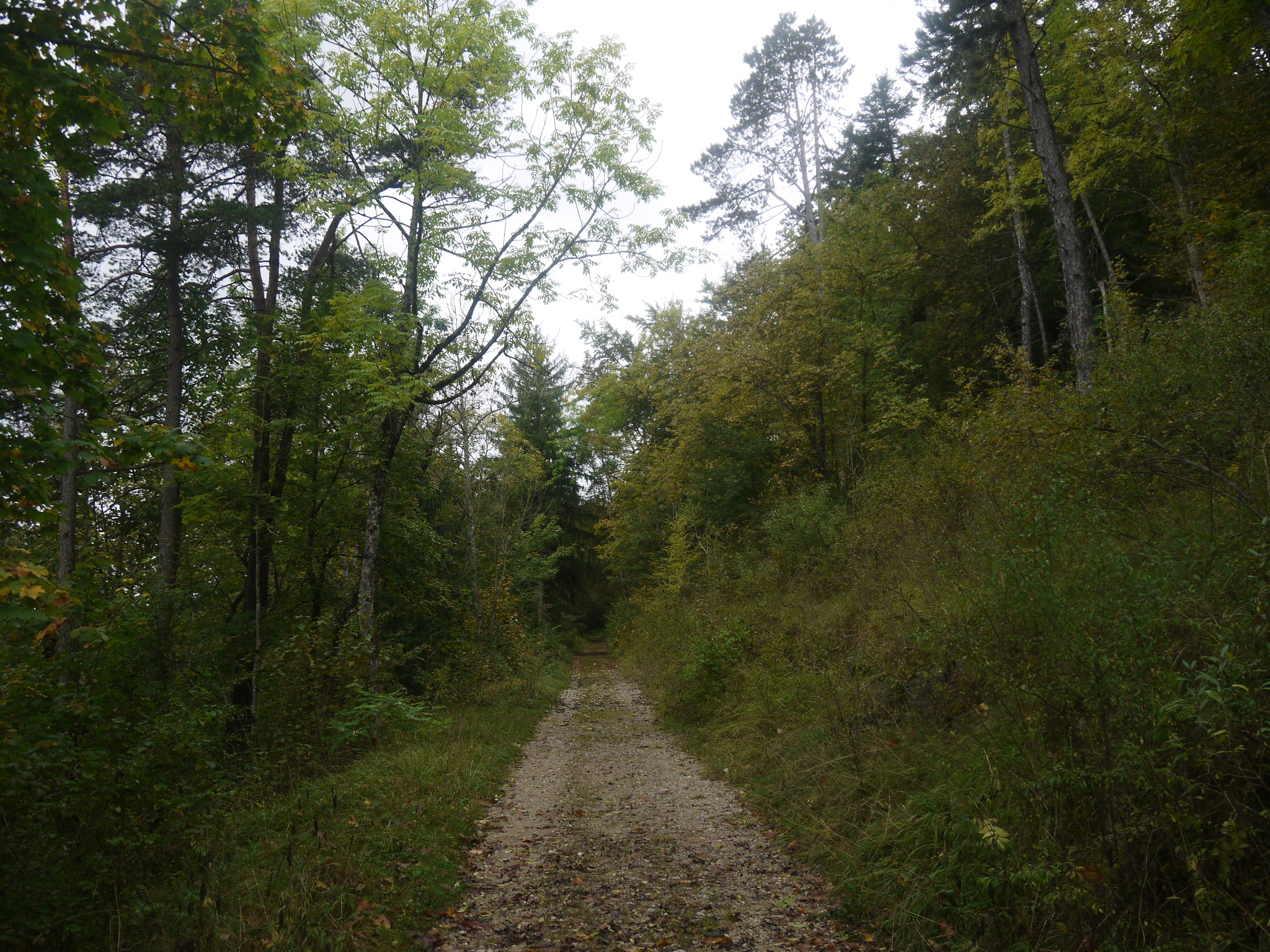 abords de Couvet